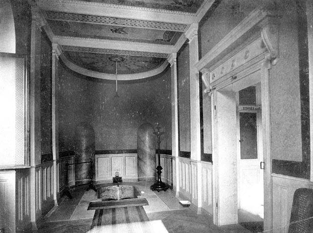 Salonbad im Vierordtbad Karlsruhe, 1898 beseitigt